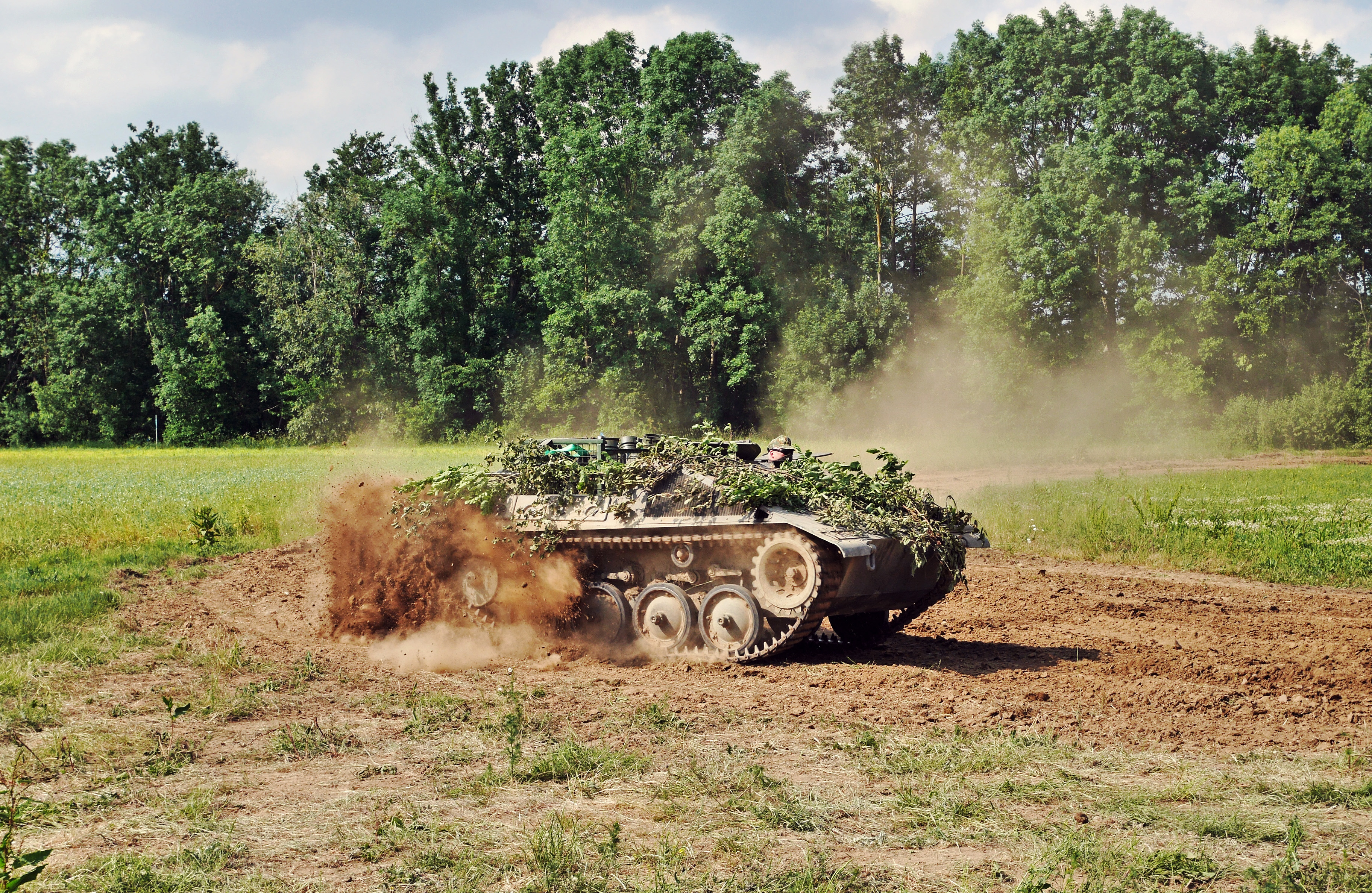 Ein Schützenpanzer Kurz in Fahrt beim Militärtag 2015 in Uffenheim. Der Schützenpanzer Kurz gehörte zur Erstausstattung der Bundeswehr mit Panzerfahrzeugen. Der Panzer basierte auf dem Schützenpanzer TT 6 der französischen Firma Hotchkiss. Hier handelt es sich um den Typ 42-1 Transportpanzer „cargo“ mit ungeschützter Transportplattform/zwei Sitzbänken und nur jeweils vier Laufrollen.